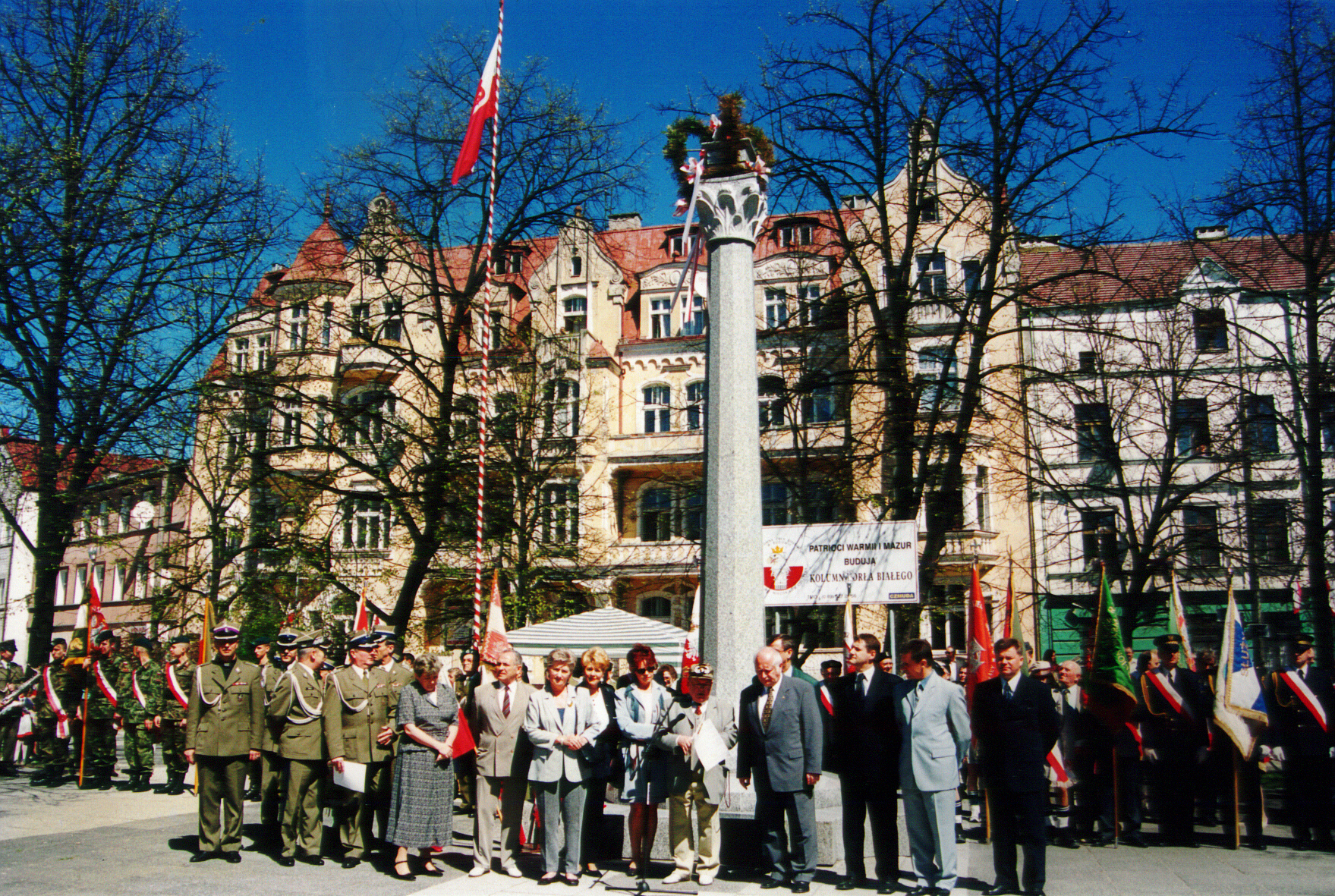 Kolumna Orła Białego w Olsztynie - kolumna jeszcze bez orła, zdjęcie z 3 maja 2001 roku.